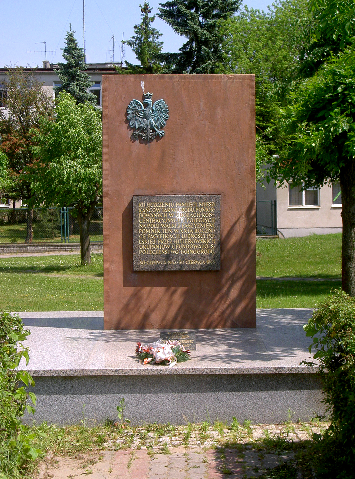 Tarnogród, Poland Monument of the Unknown Warrior Pomnik Nieznanego Żołnierza